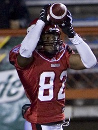 Nik Lewis